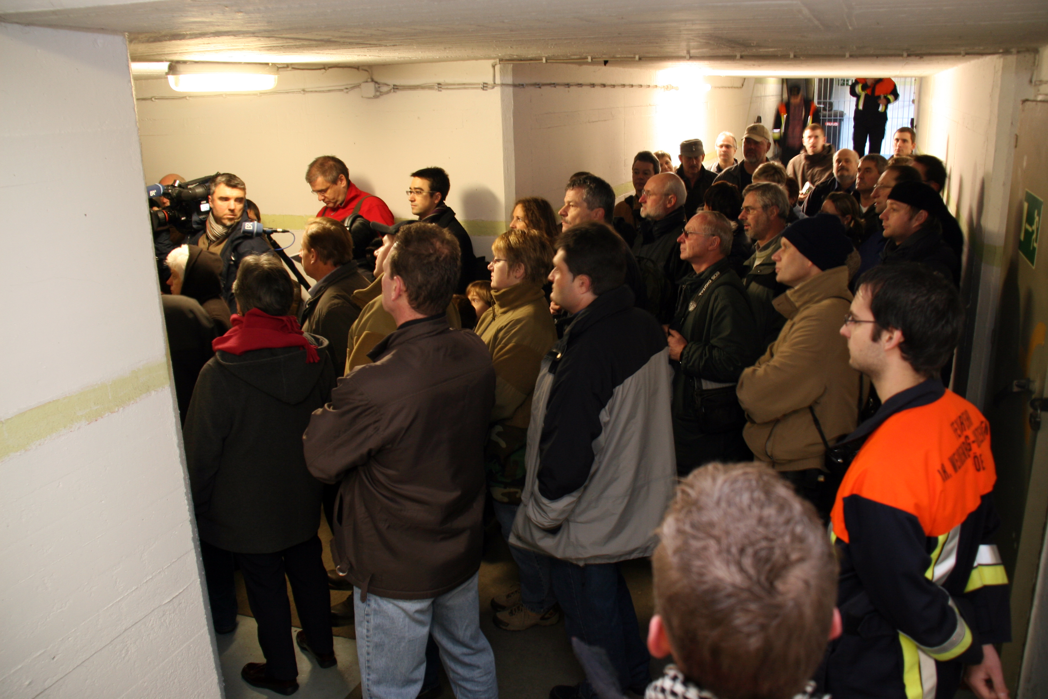 Besucherandrang mit Kamerateam des Bay. Fernsehen bei der ersten öffentlichen Führung im Hilfskrankenhaus Gunzenhausen unterhalb der Berufsschule, Nov. 2009